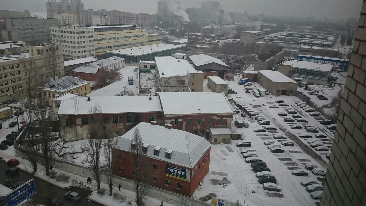 Церковь Рождества Христова на Придаче: улица Димитрова, 51, Воронеж, Воронежская область